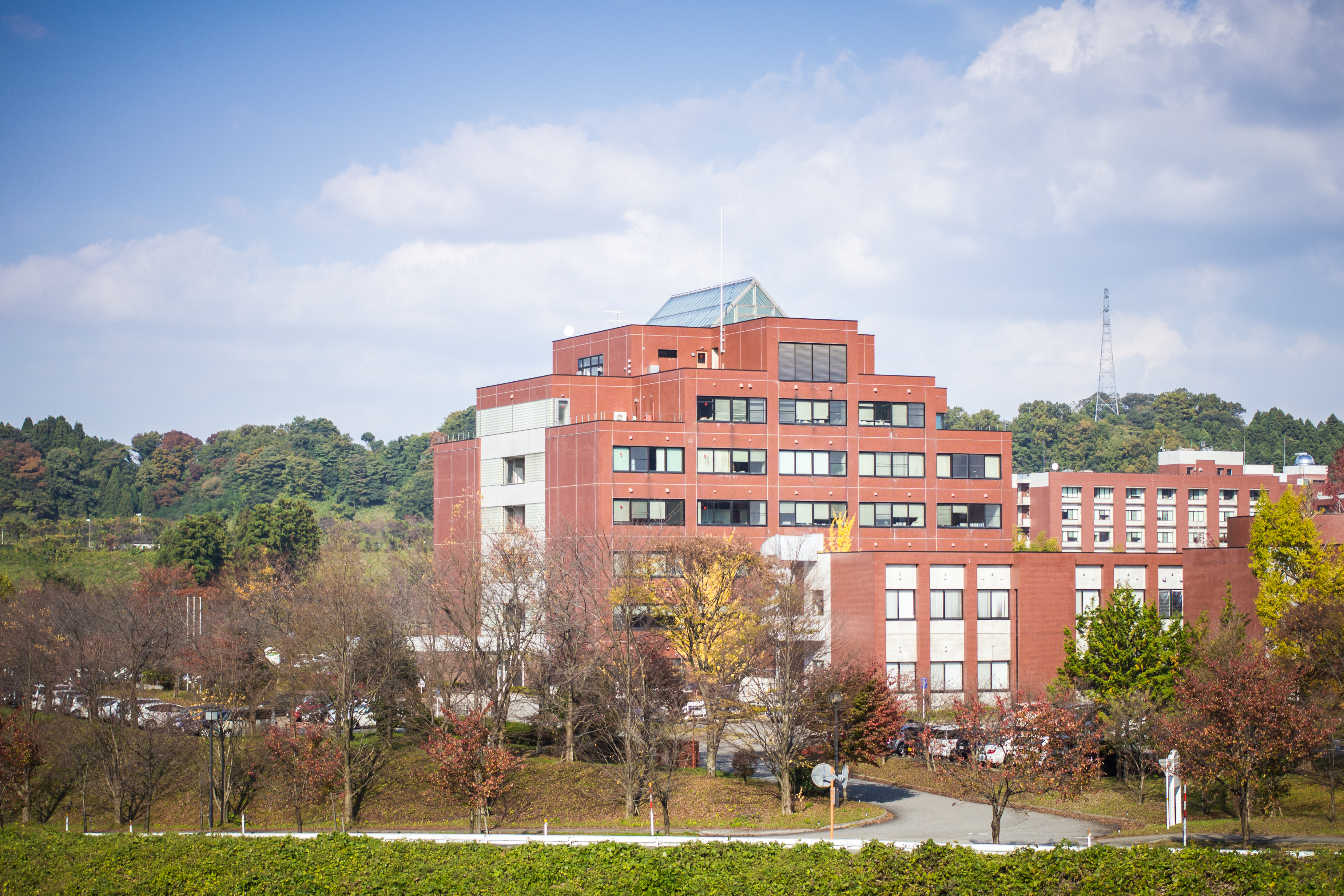 金沢市角間町にある金沢大学本部棟